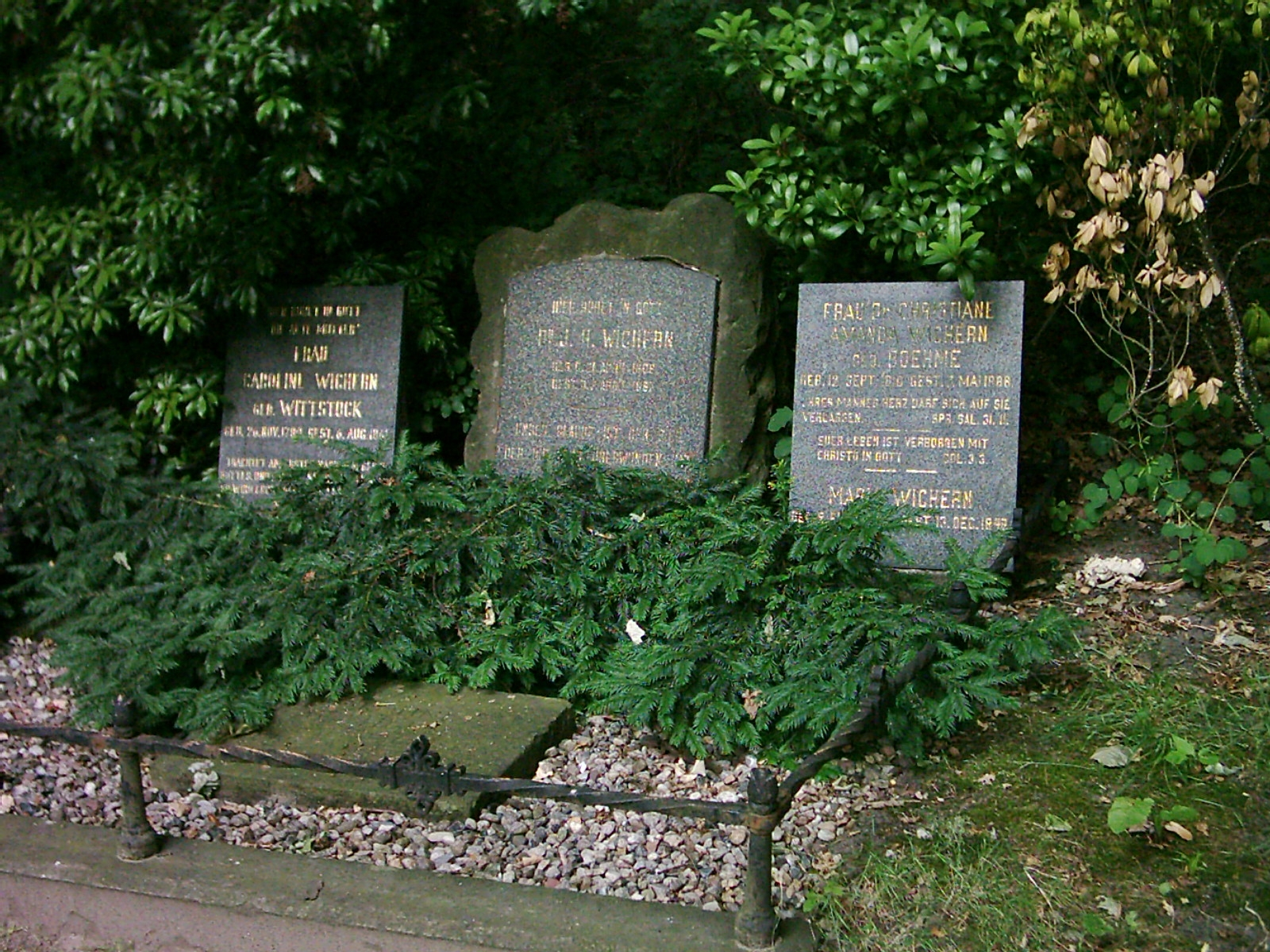 Grabstätte von Johann Hinrich Wichern auf dem Friedhof der Dreifaltigkeitskirche in Hamburg-Hamm.